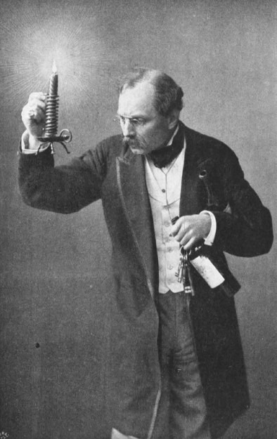 Oscar Sauer im Stück "Fuhrmann Henschel" von Gerhart Hauptmann am Deutschen Theater Berlin